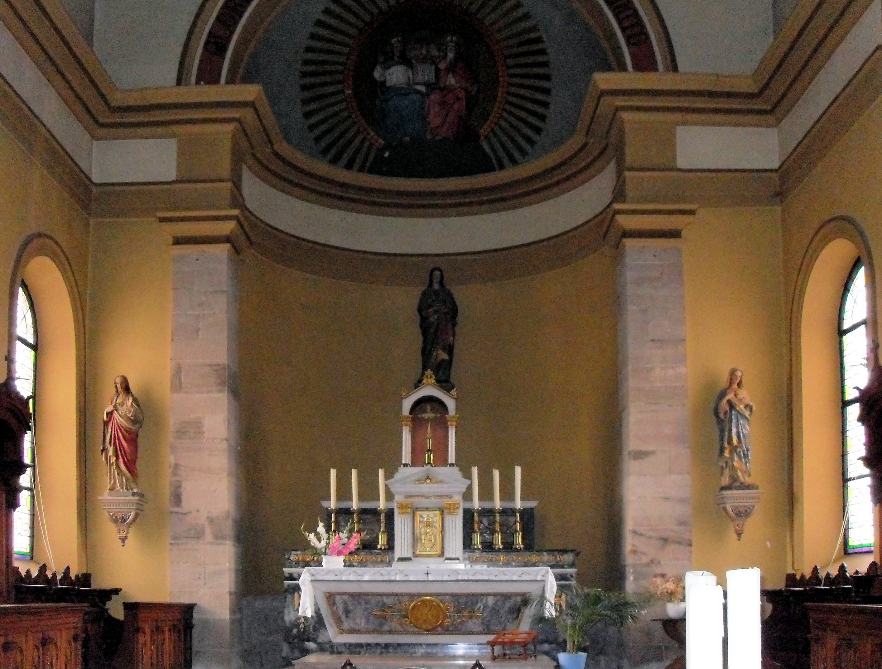 L'intérieur d'église Sainte-Agathe à Gundolsheim